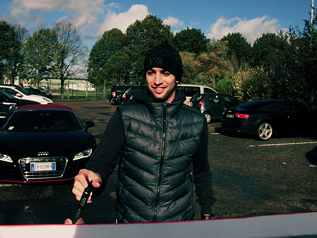 Javier Pastore au Camp des Loges en novembre 2012